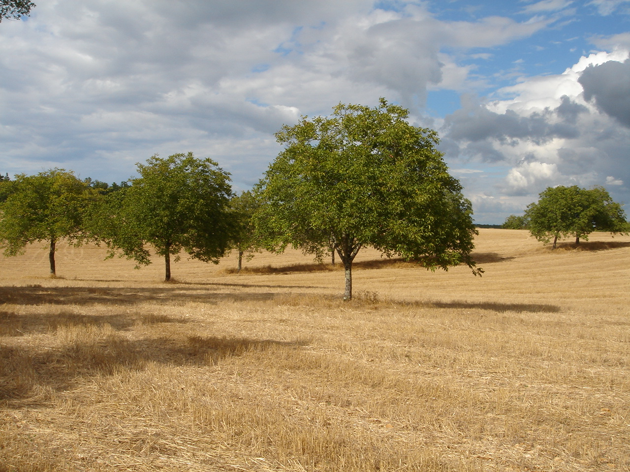 Walnussbäume bei Savignac-les-Eglises (Dordogne, Frankreich).